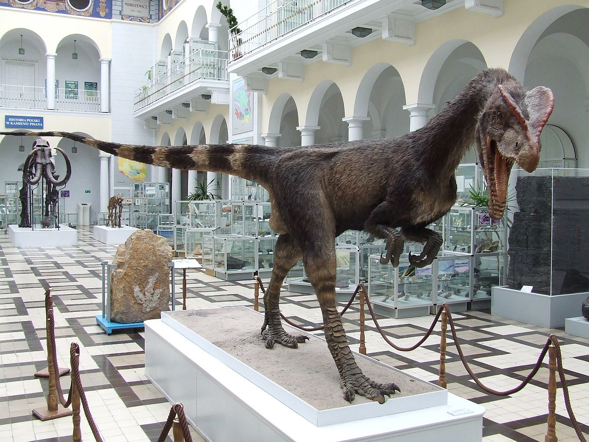 Dilofozaur, Dilophosaurus wetherilli, Welles 1970. Model in Muzeum Geologiczne Państwowego Instytutu Geologicznego, Warszawa